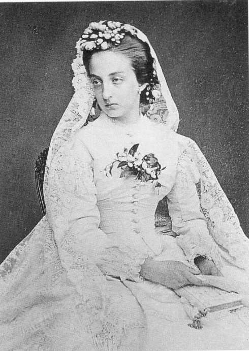 Portrait de Marie-Isabelle, comtesse de Paris (1848-1919) le jour de ses noces avec Philippe VII